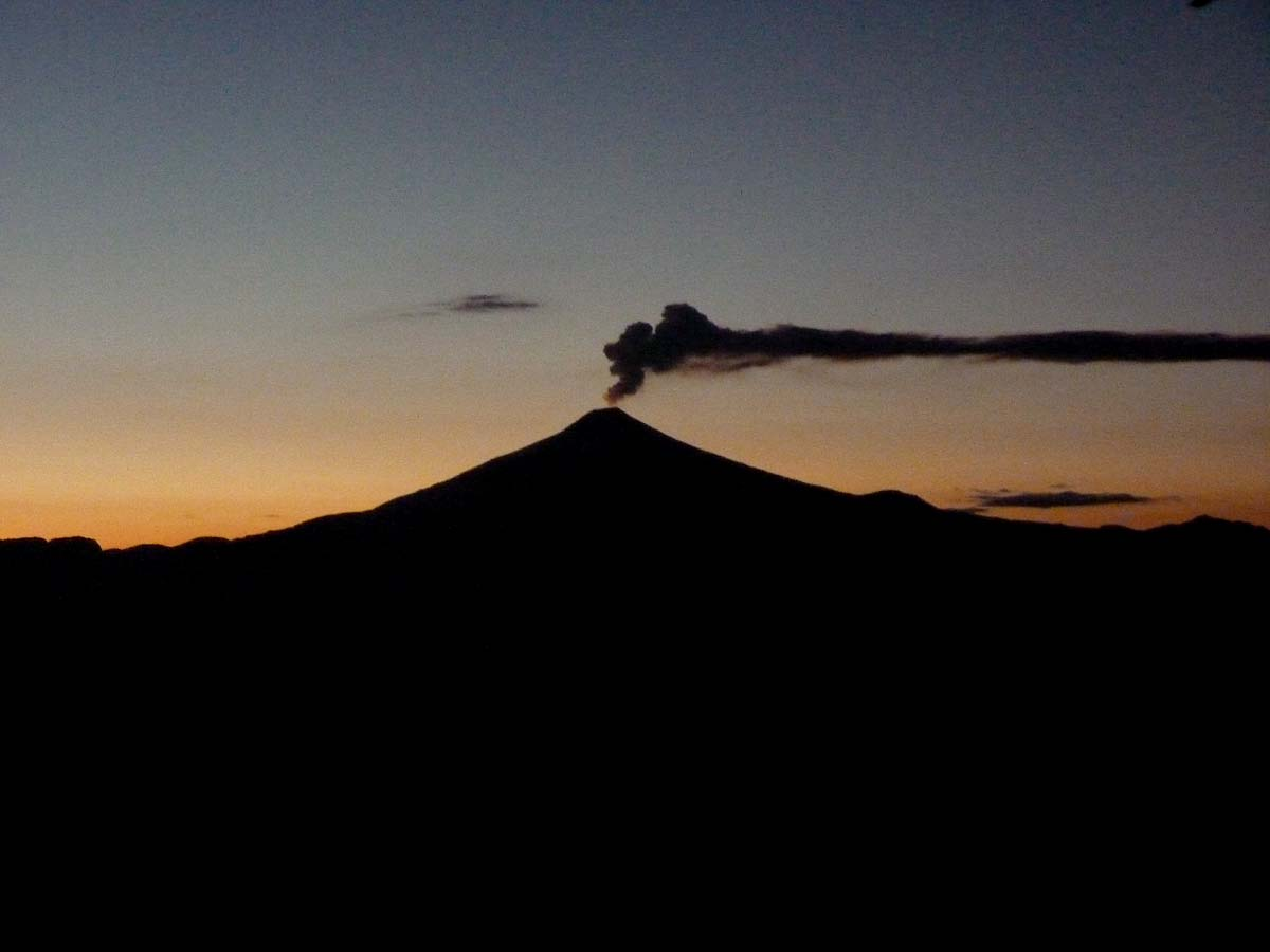 Naturaleza, paisaje, Volcan Villarrica en el atardecer, Villarrica, Araucanía, 9. región